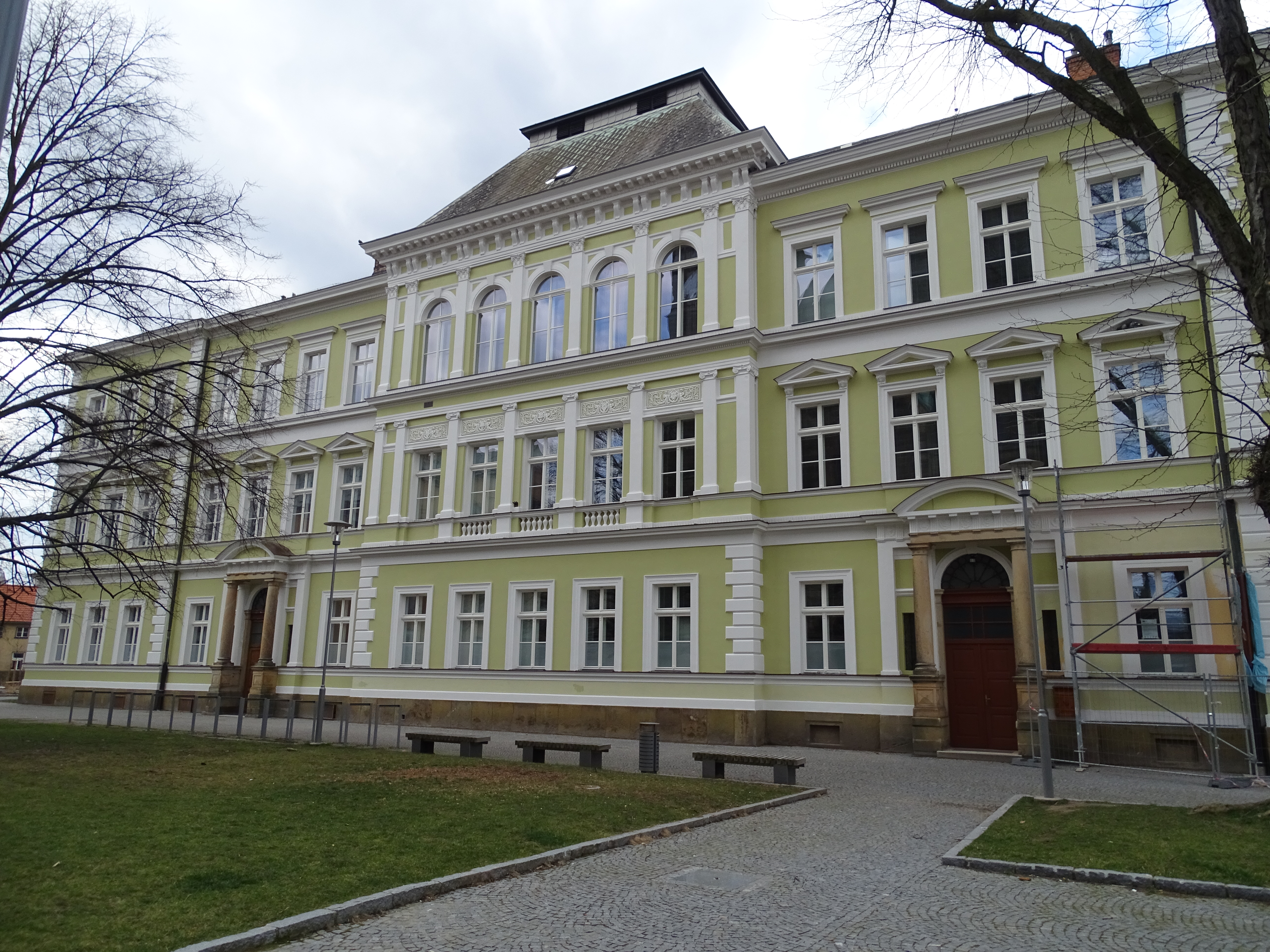 Gymnázium Vysoké Mýto